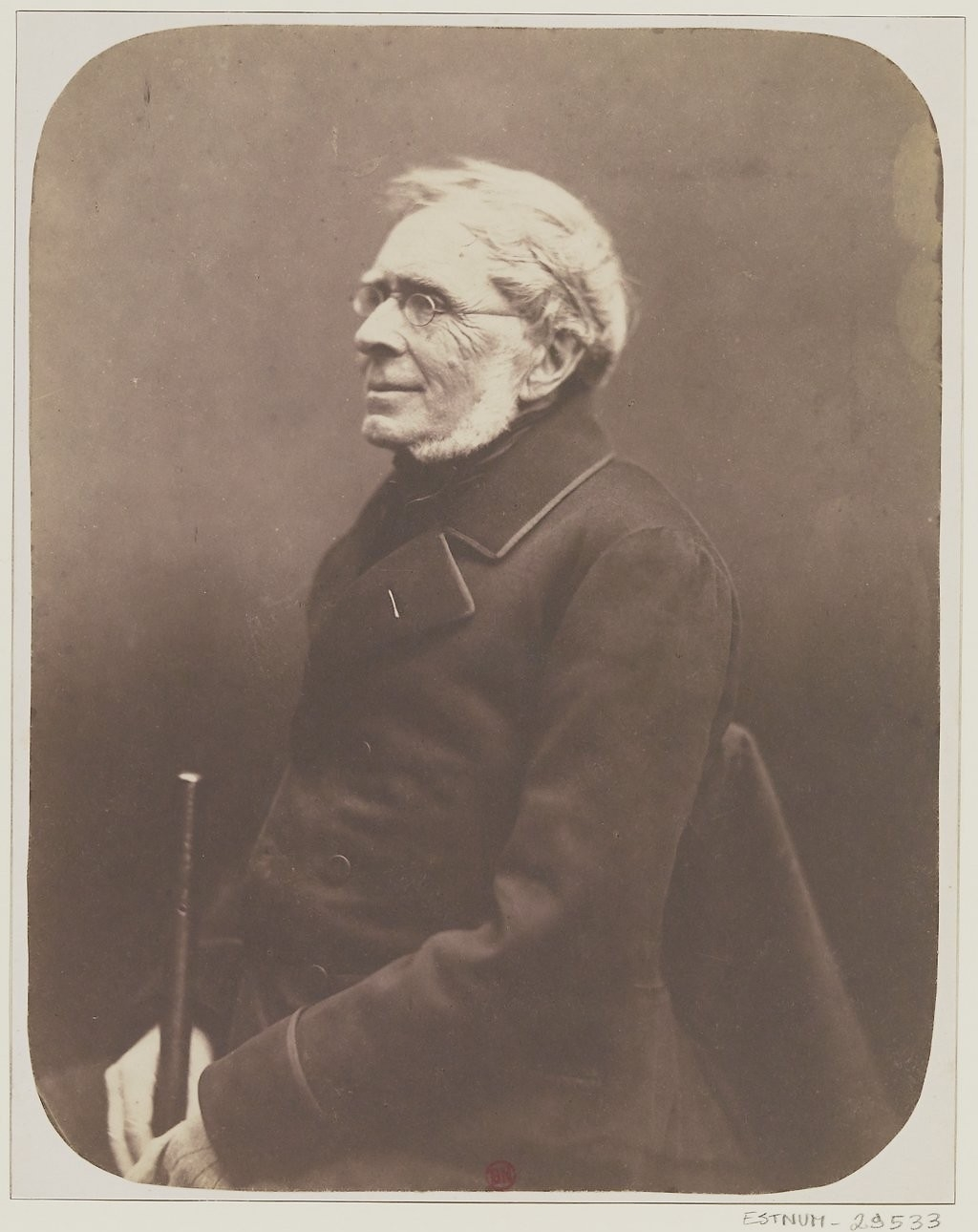 Portrait photographique de Charles-Gaspard Delestre-Poirson (1790-1859) par Nadar. Cliché 23,1 x 18 cm. Tirage sur papier salé d'après une plaque de verre, Nadar avant 1859. Bibliothèque nationale de France ark:/12148/btv1b105354112